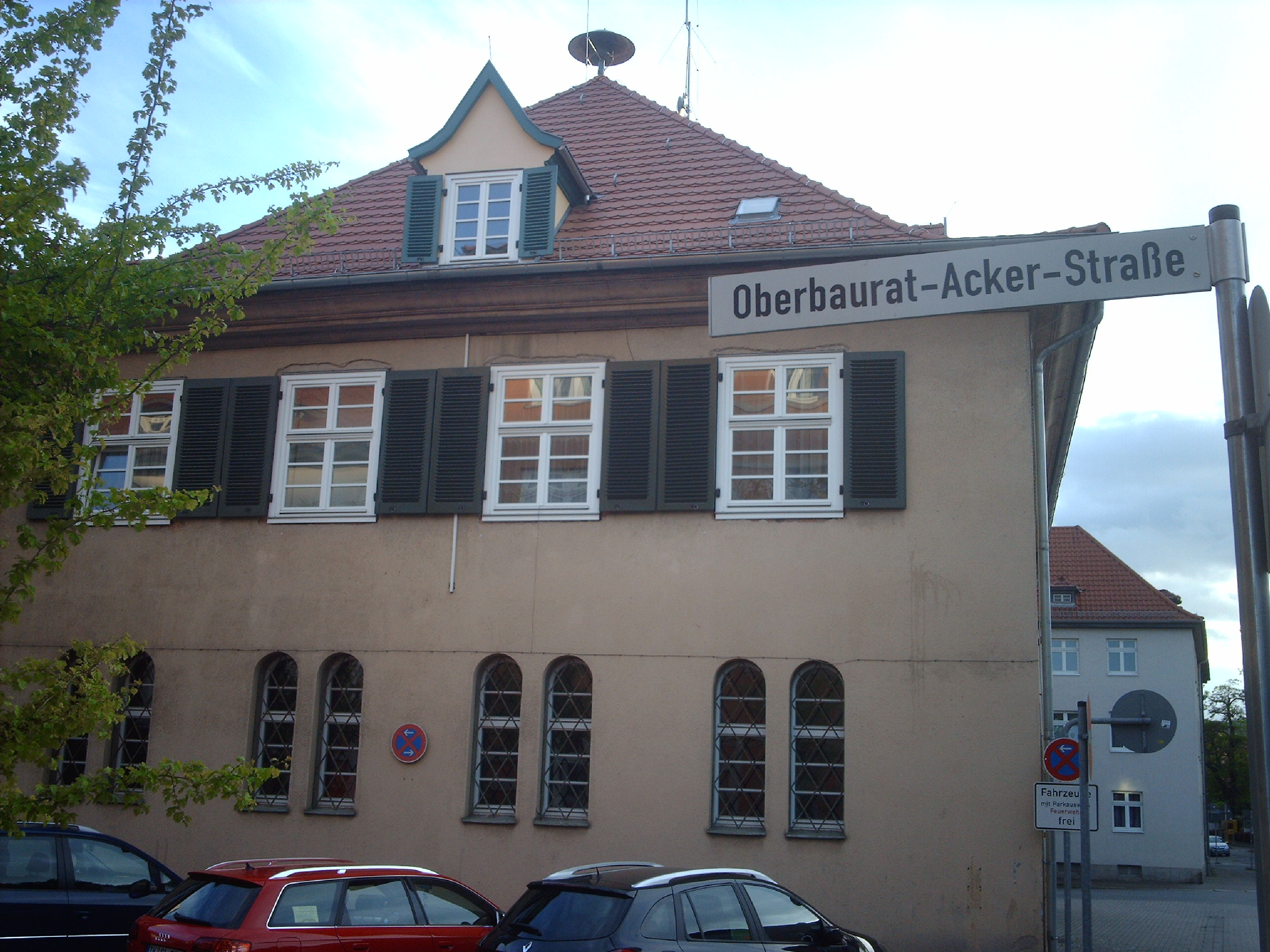 Oberbaurat Acker-Straße in Arnstadt, im Hintergrund die historische Feuerwache.